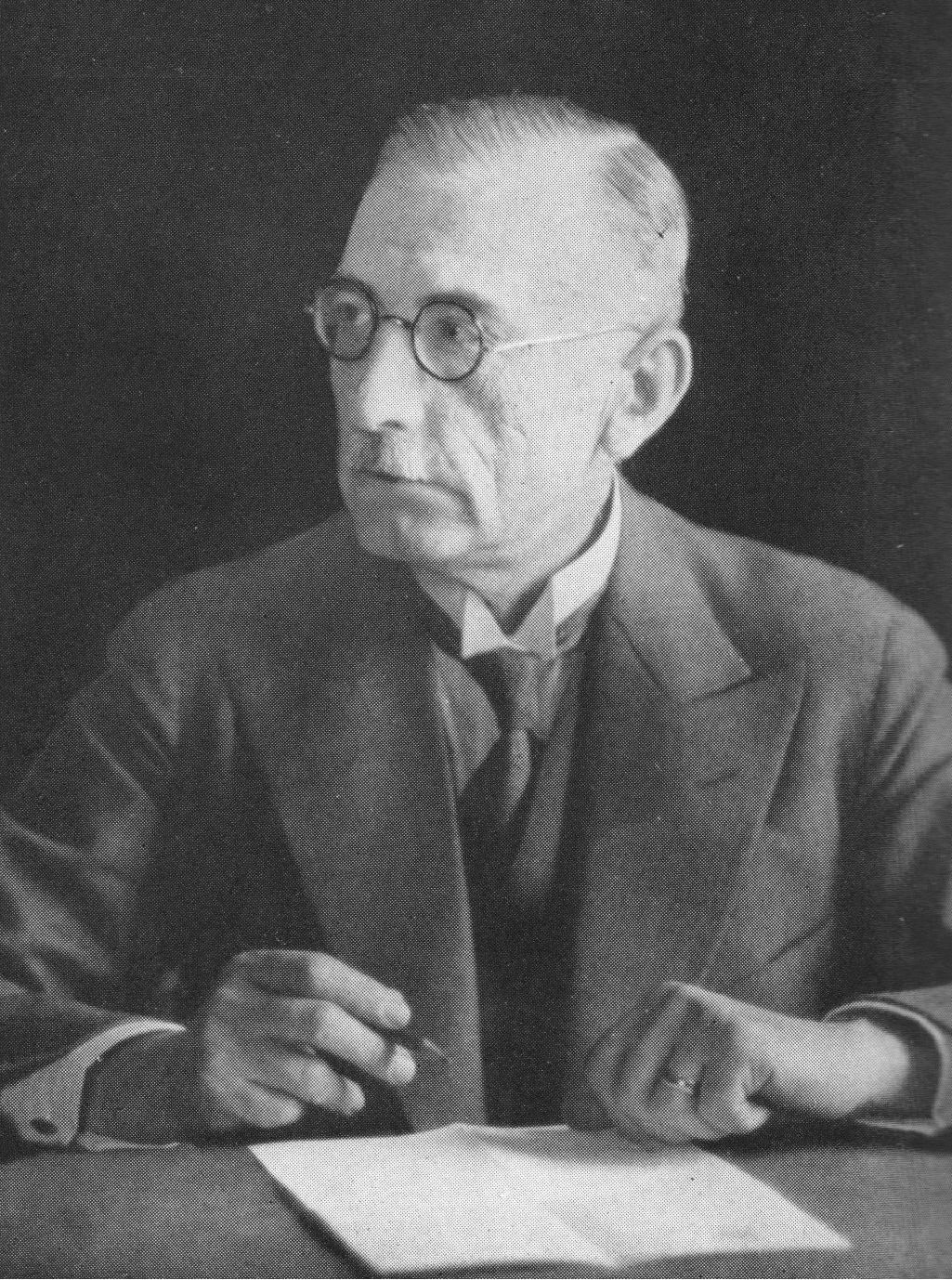 Porträt-Fotografie Wilhelm Frhr. v. Gayl